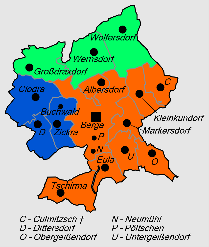 Gliederung der Stadt Berga/Elster ab 22. Januar 1994